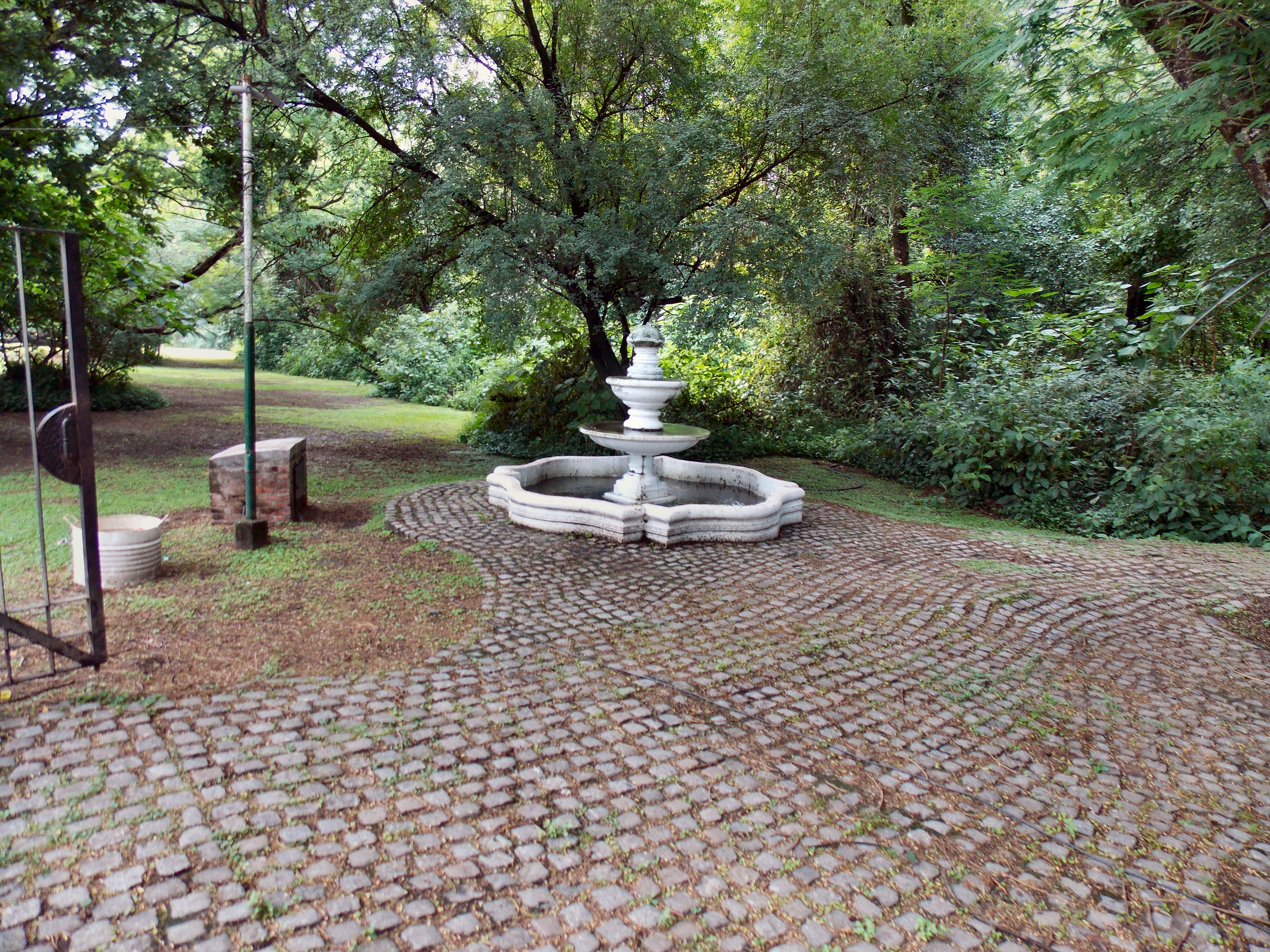 Fuente en el ingreso del parque